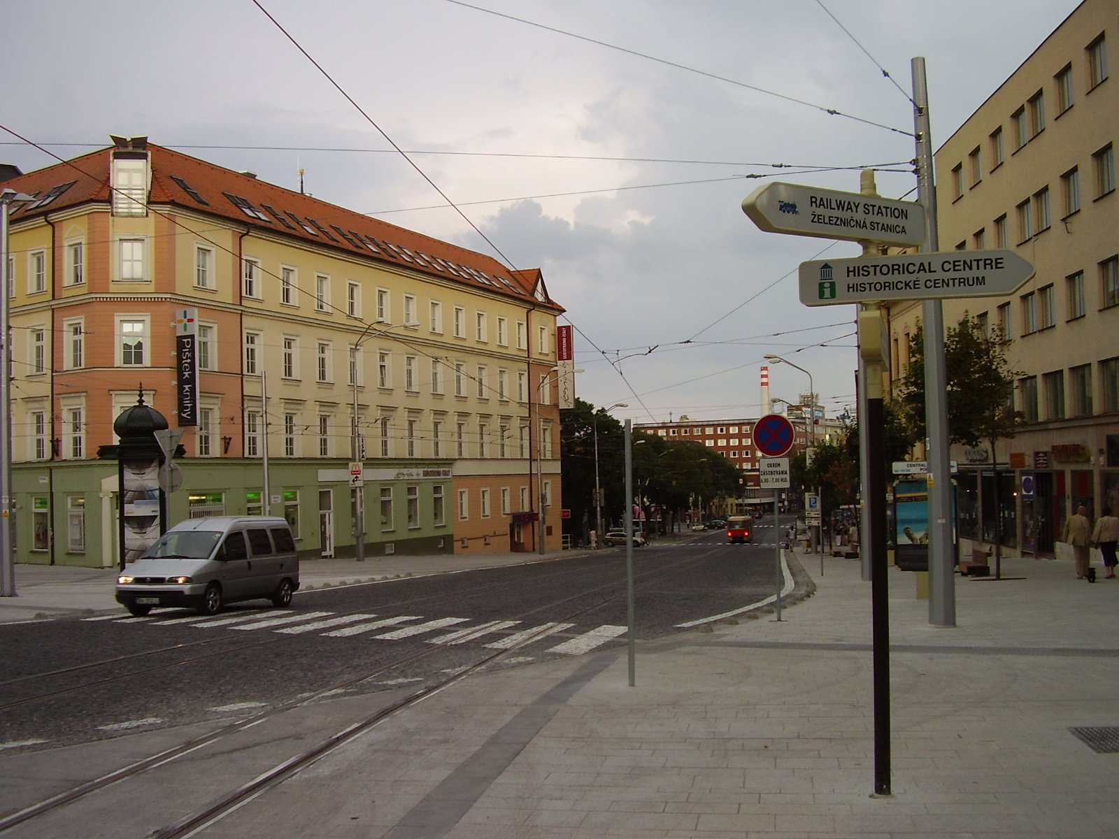 Námestie SNP po rekonštrukcii v roku 2006.